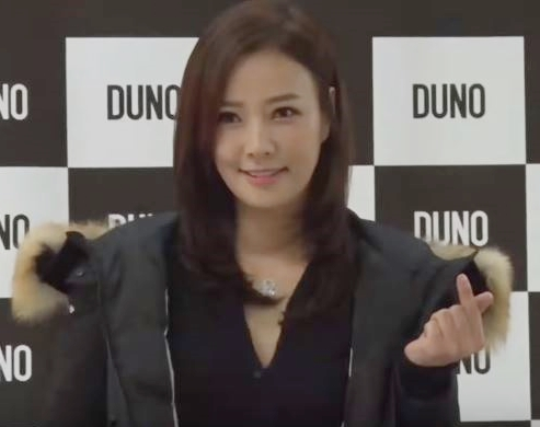 디스패치 구독 클릭!